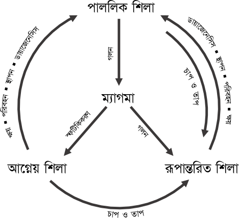 এক ধরণের শিলা থেকে অন্য ধরণের শিলায় রুপান্তর